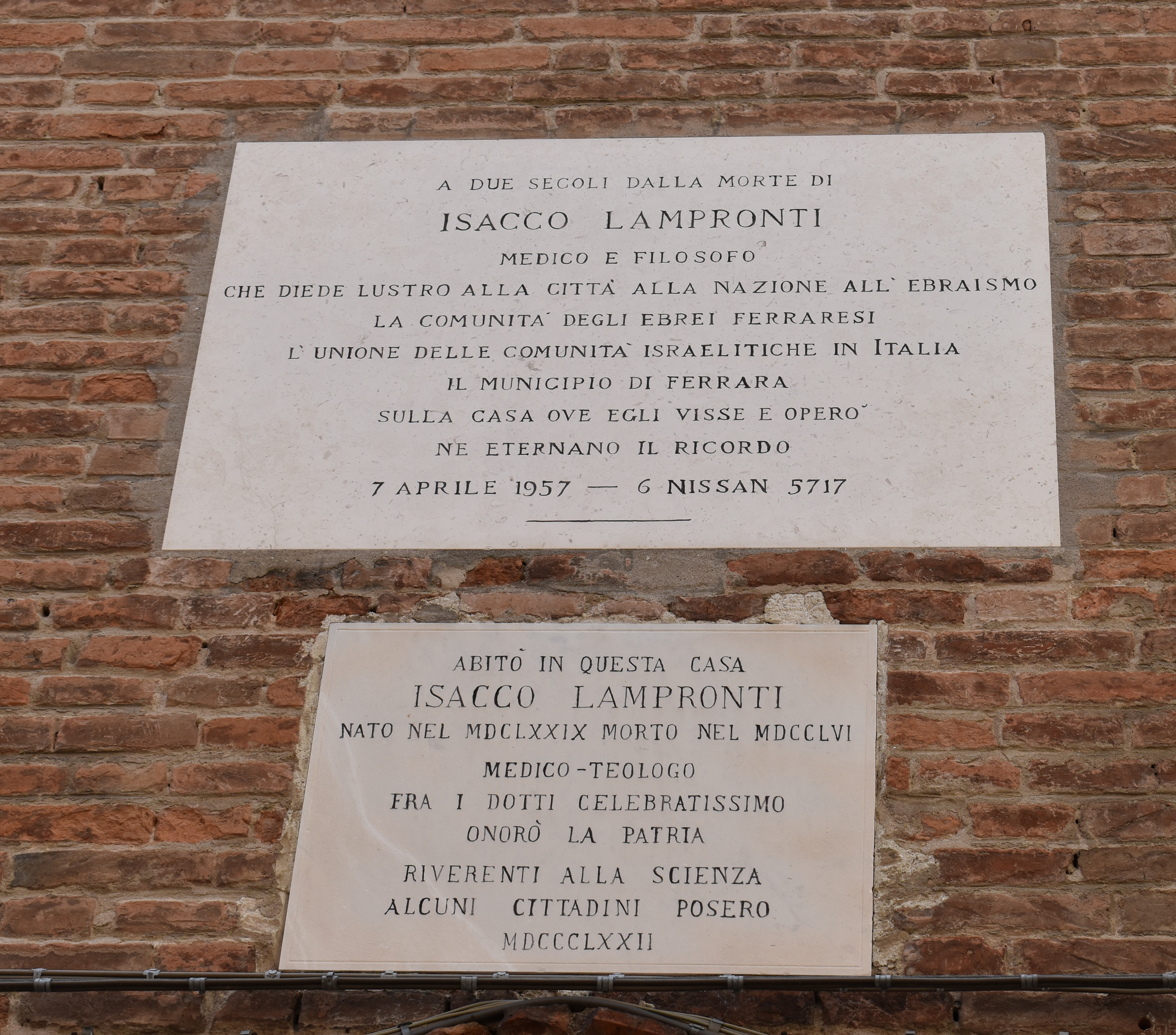 Lapidi sulla facciata della casa di Isacco Lampronti in via Vignatagliata n. 33 a Ferrara